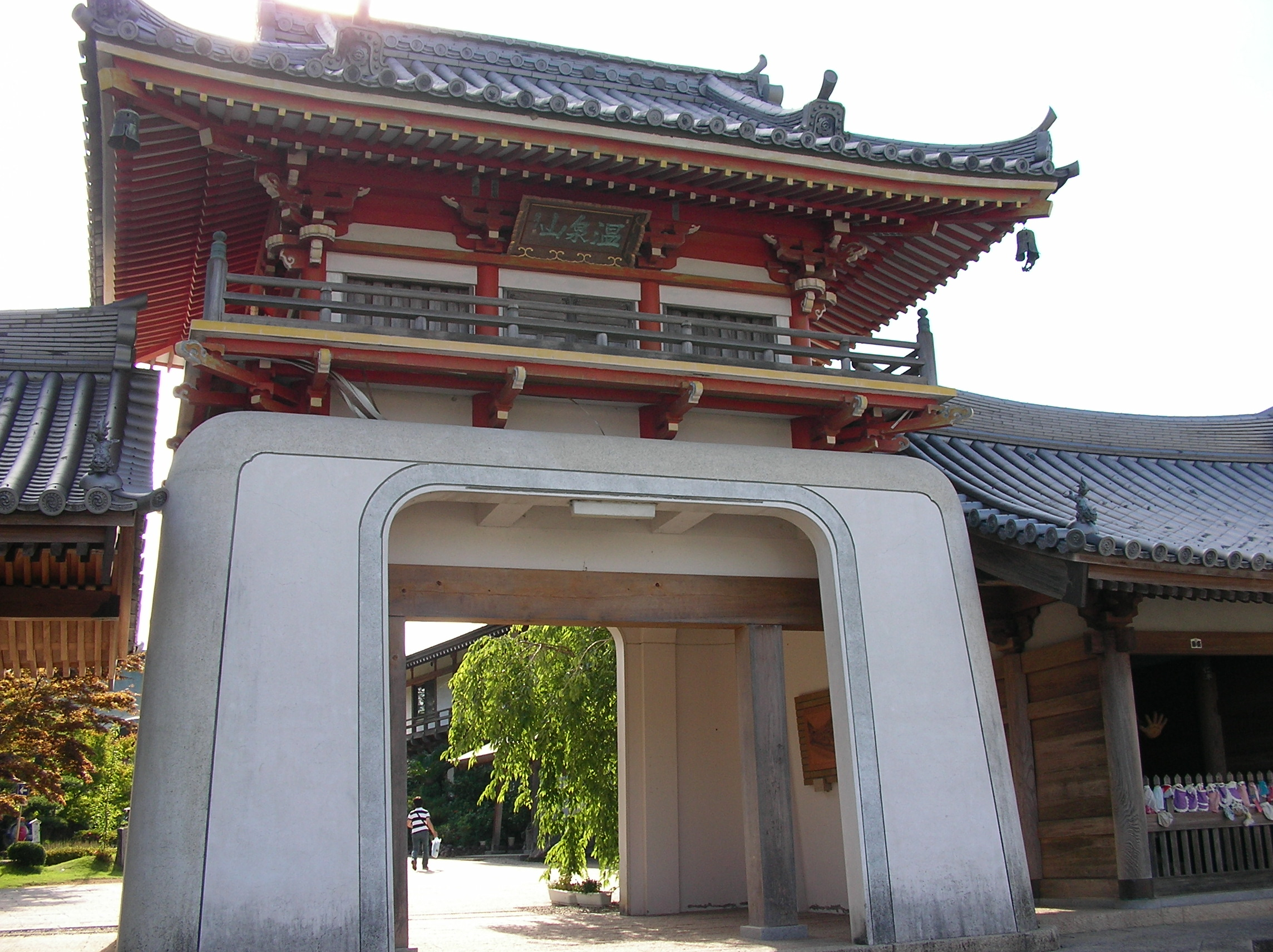 onsenzan-anrakuji-sanmon